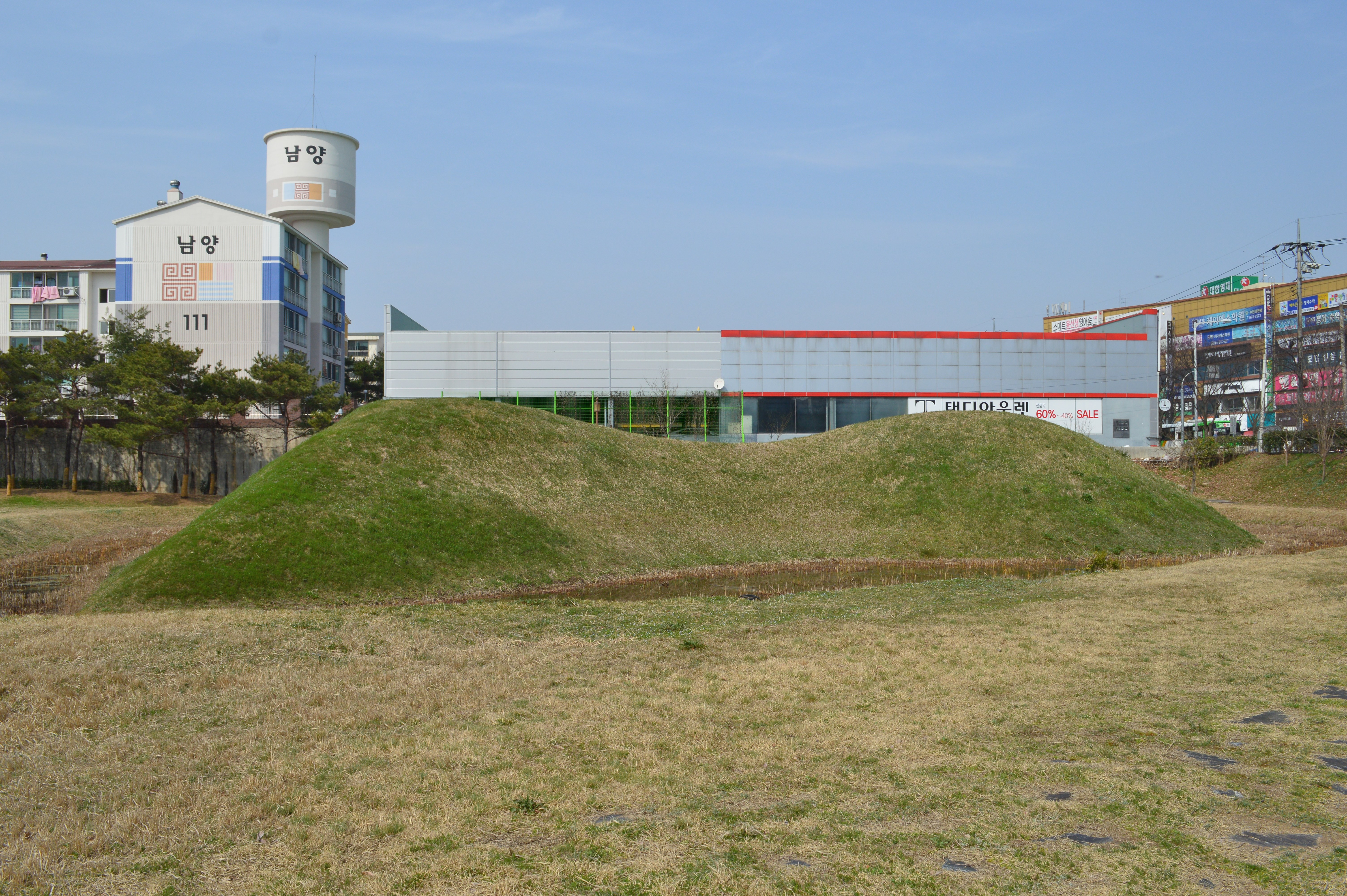 光州月桂洞2号墳 横から